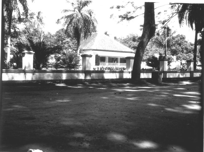 Foto. De woning van de assistent-resident te Bondowoso op Oost-Java